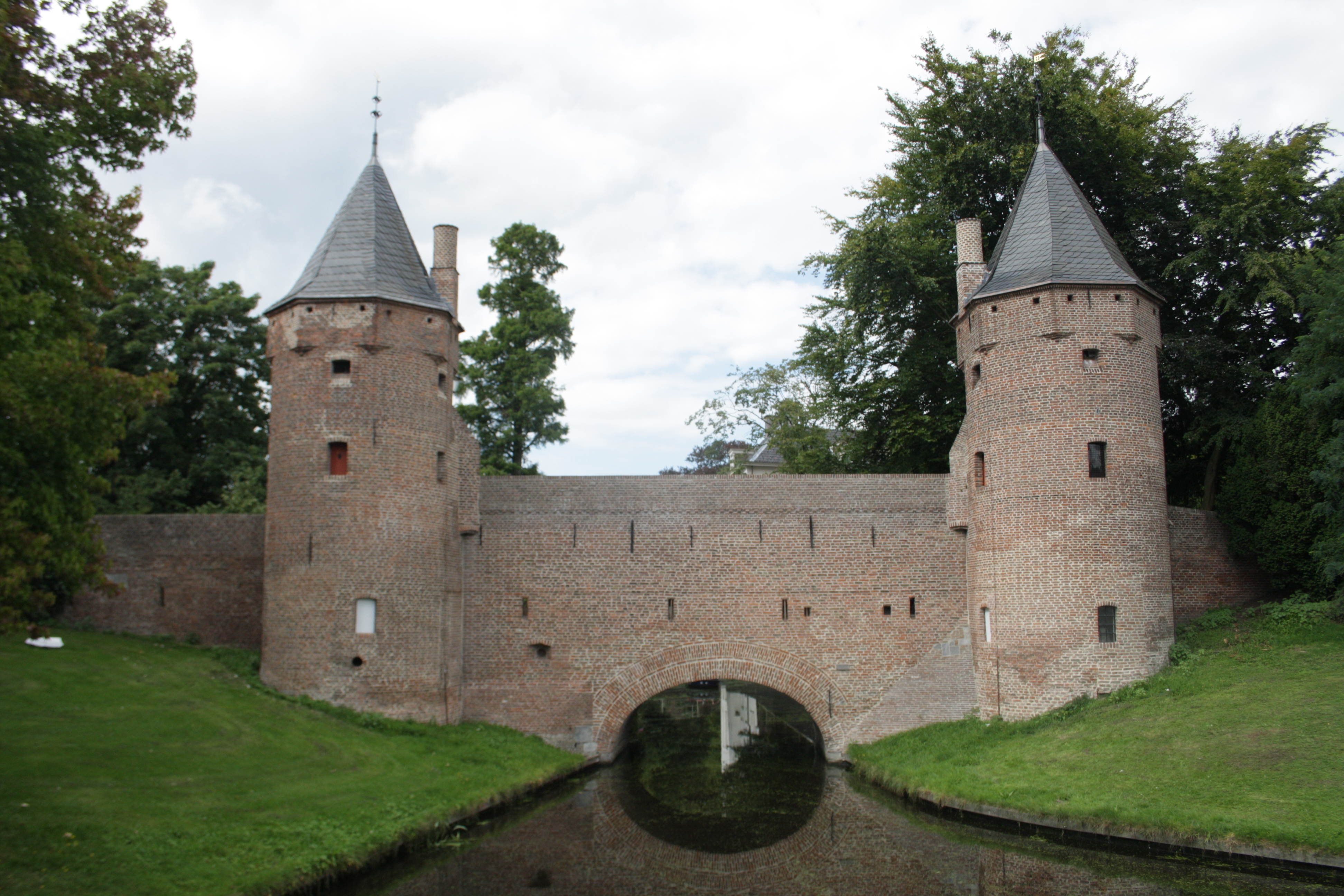 Monnikendam: waterpoort door twee zware ronde torens geflankeerd